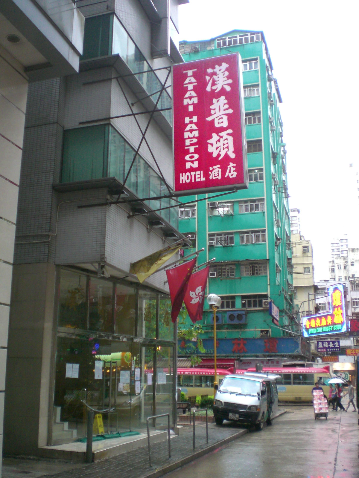 香港旺角長沙街 - 漢普頓酒店